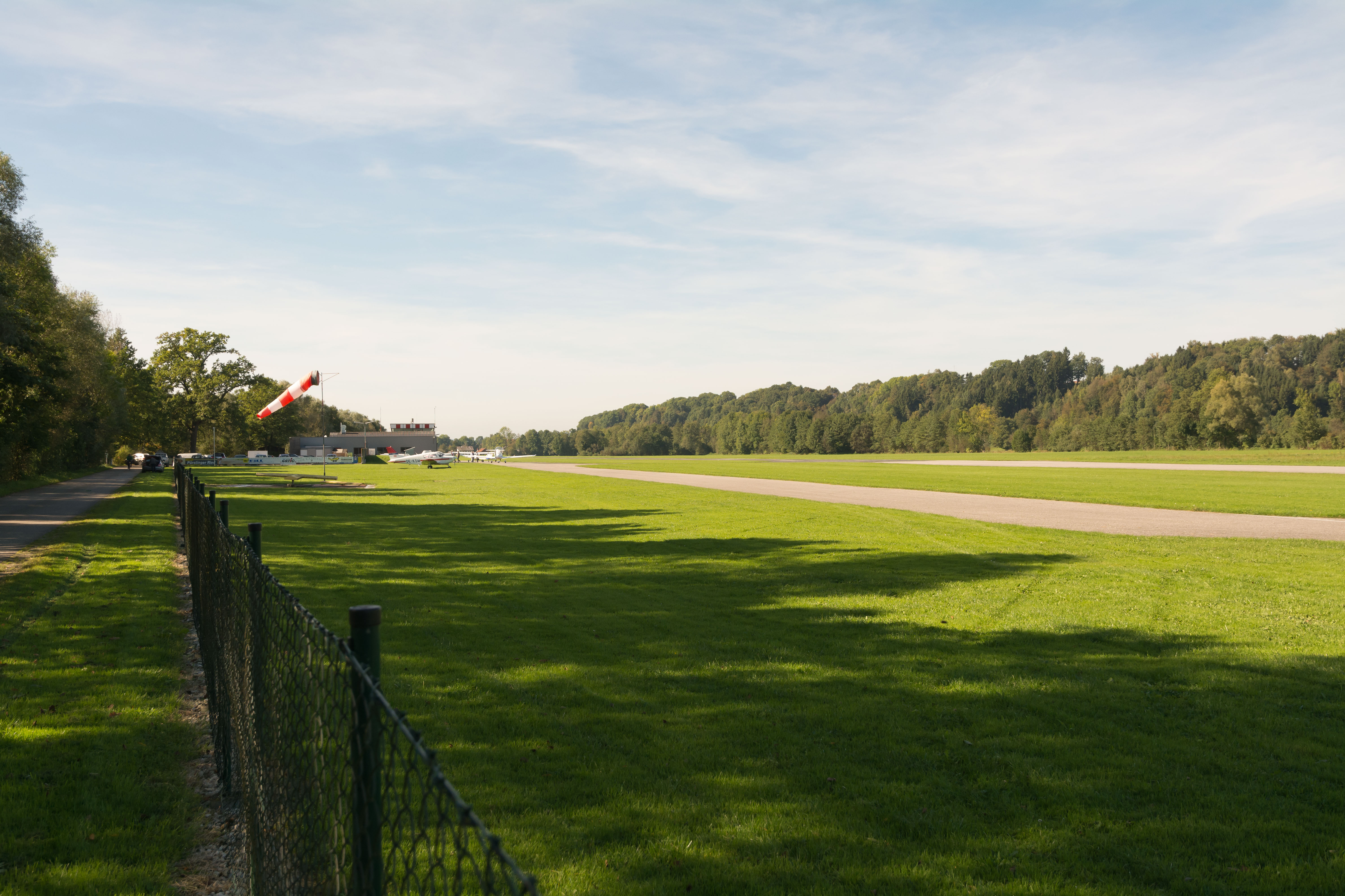 Flugplatz Ried-Kirchheim LOLK, Austria